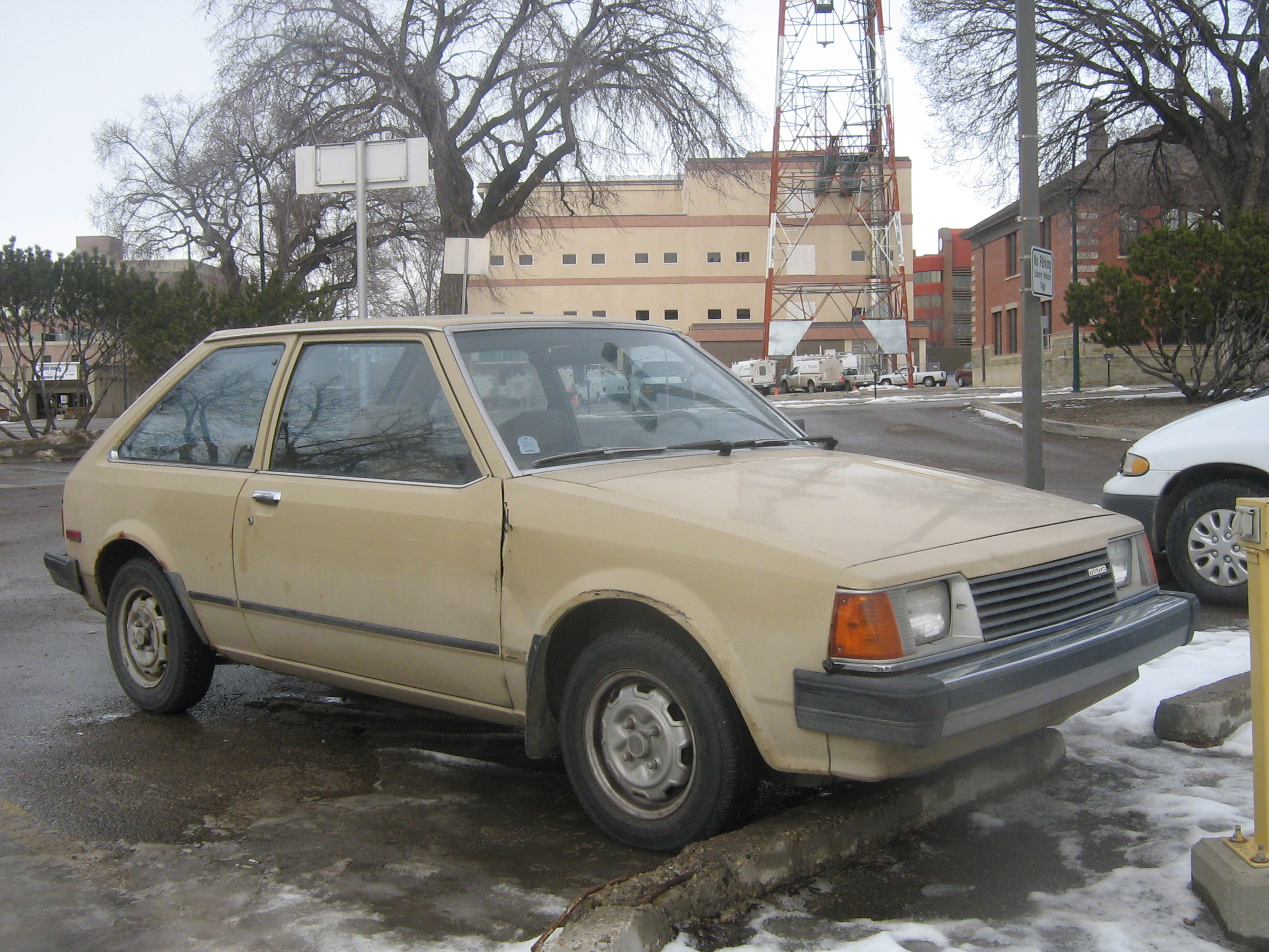 1981-1982 Mazda GLC